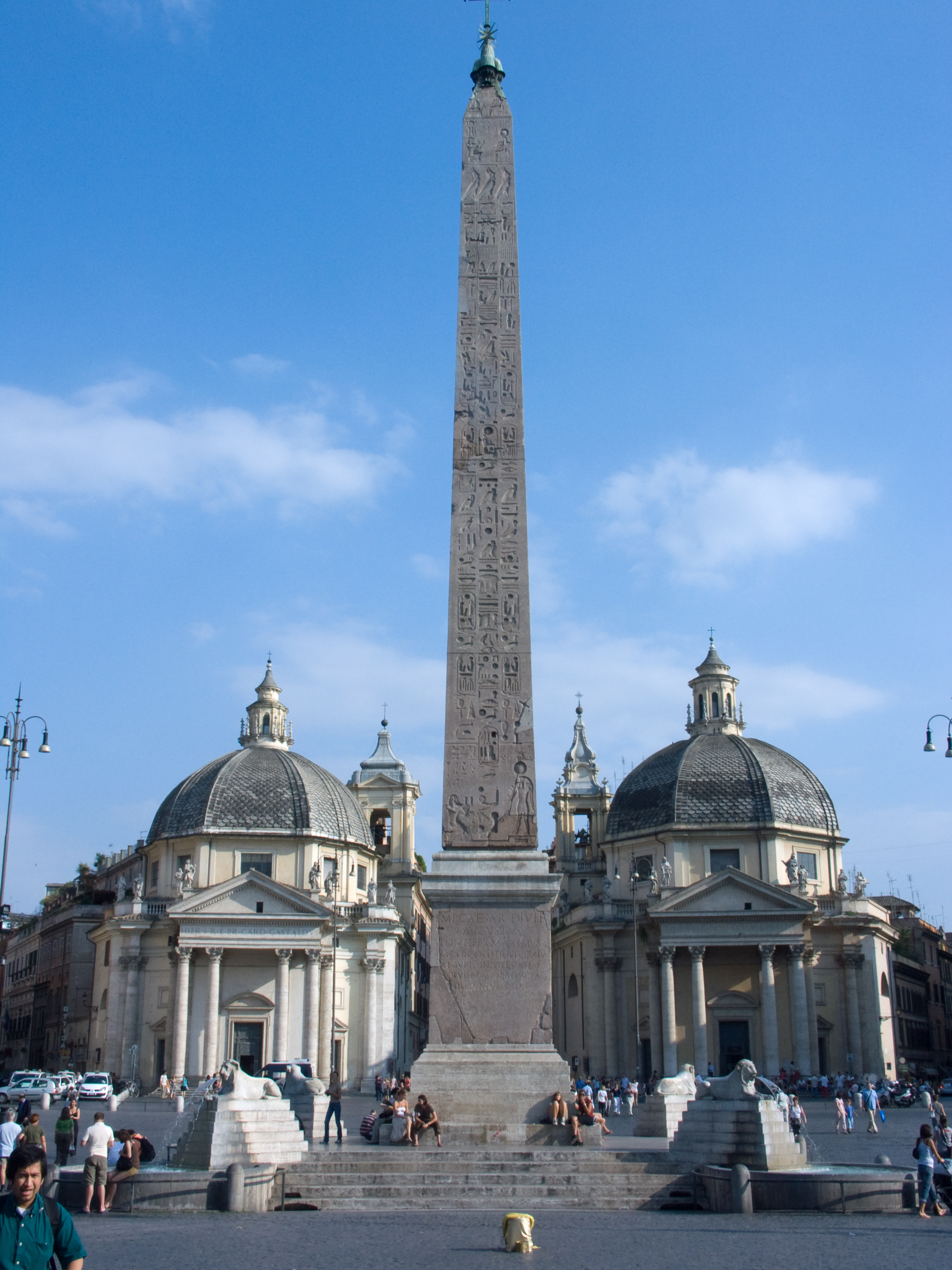 Rome, Piazza del Popolo, Obélisque et églises Santa Maria